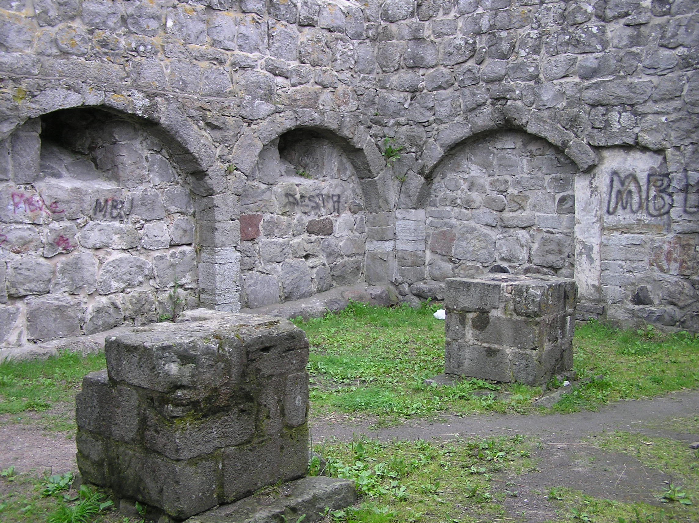 Åhus, ruin af ærkebiskop Eskils borg, 1100-tallet